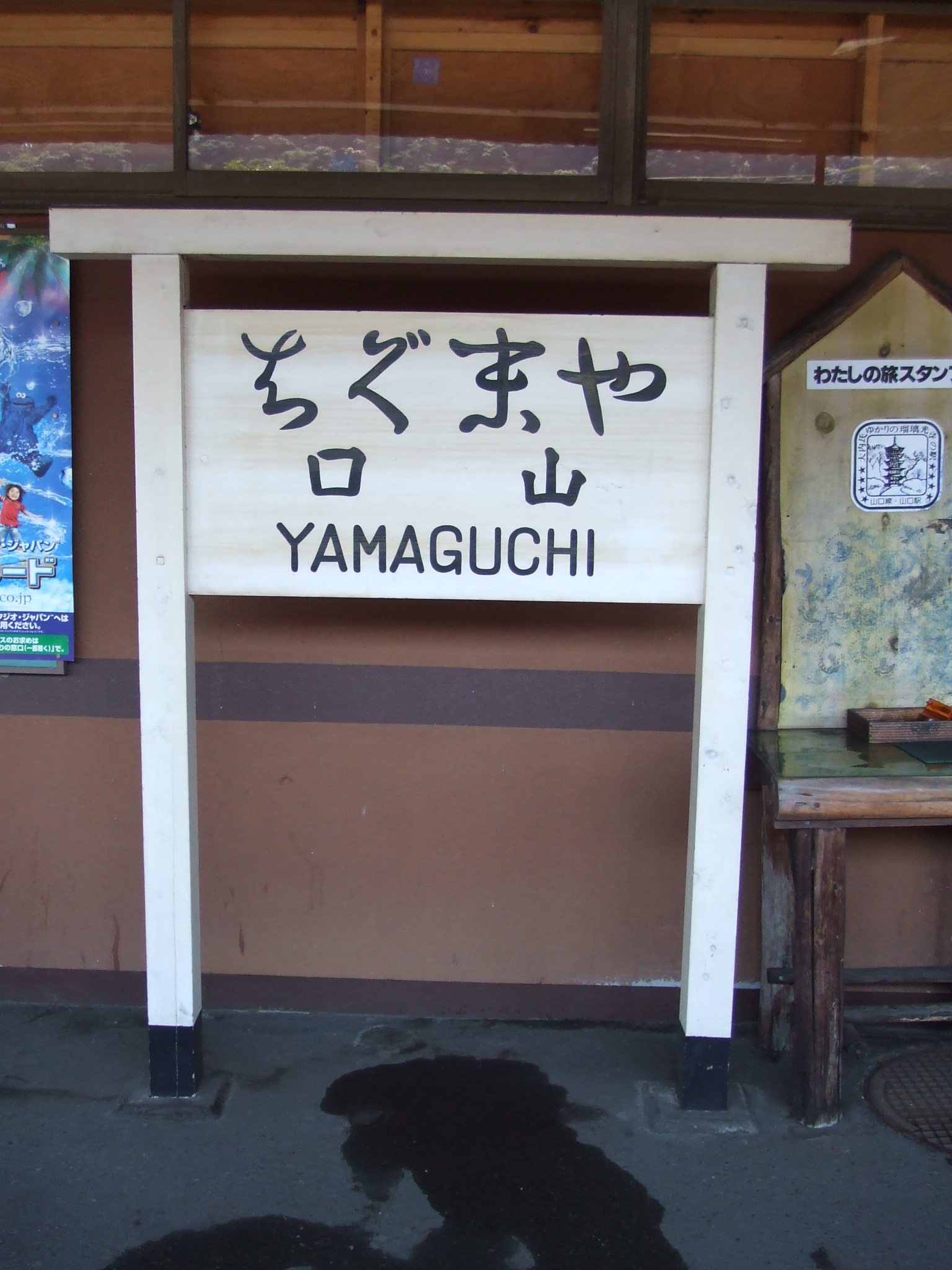 山口駅 旧駅名標